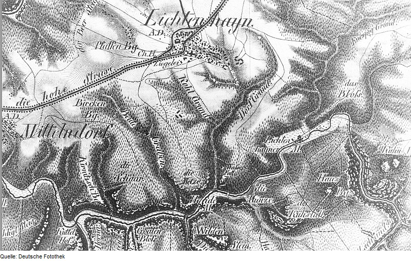 Original image description from the Deutsche Fotothek Kirnitzschtal-Lichtenhain. Oberreit, Sect. Stolpen, 1821/22